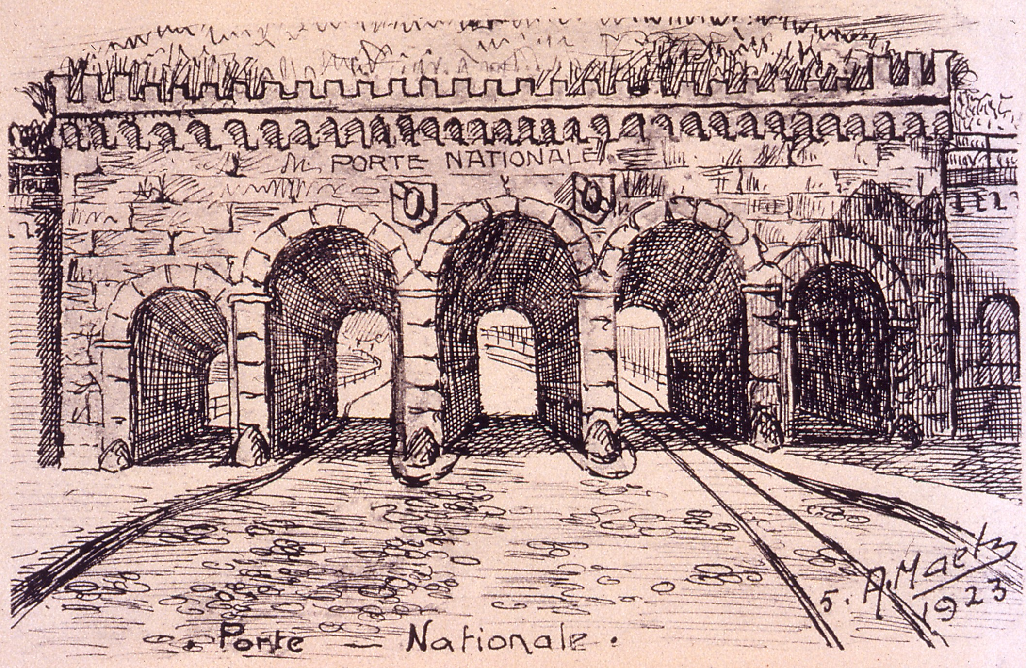 Dessin de la Porte Nationale de Strasbourg par A. Maetz